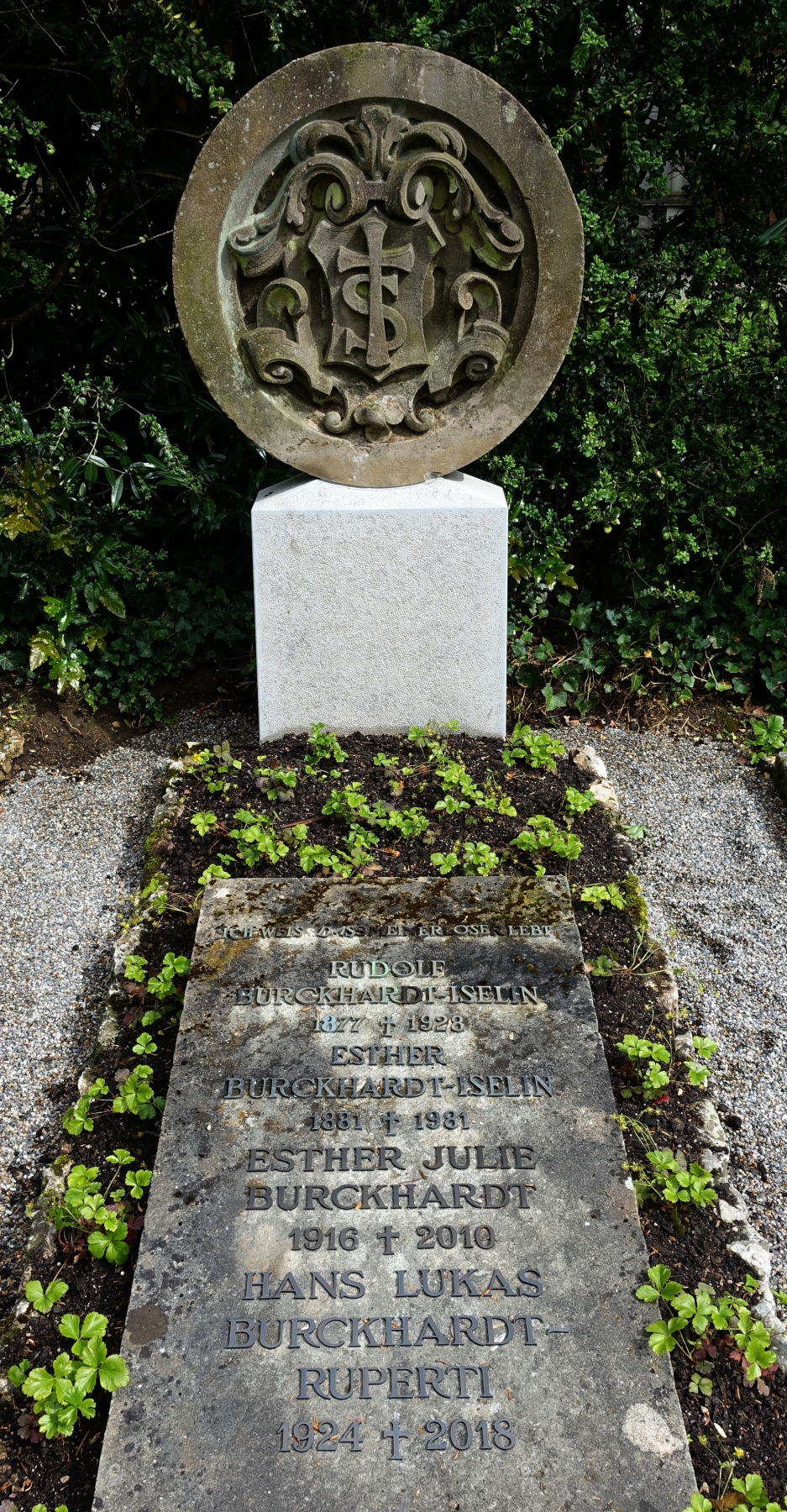 Hans Lukas Burckhardt-Ruperti (1924–2018), Anwalt, Politiker. Familien Grab Wolfgottesacker